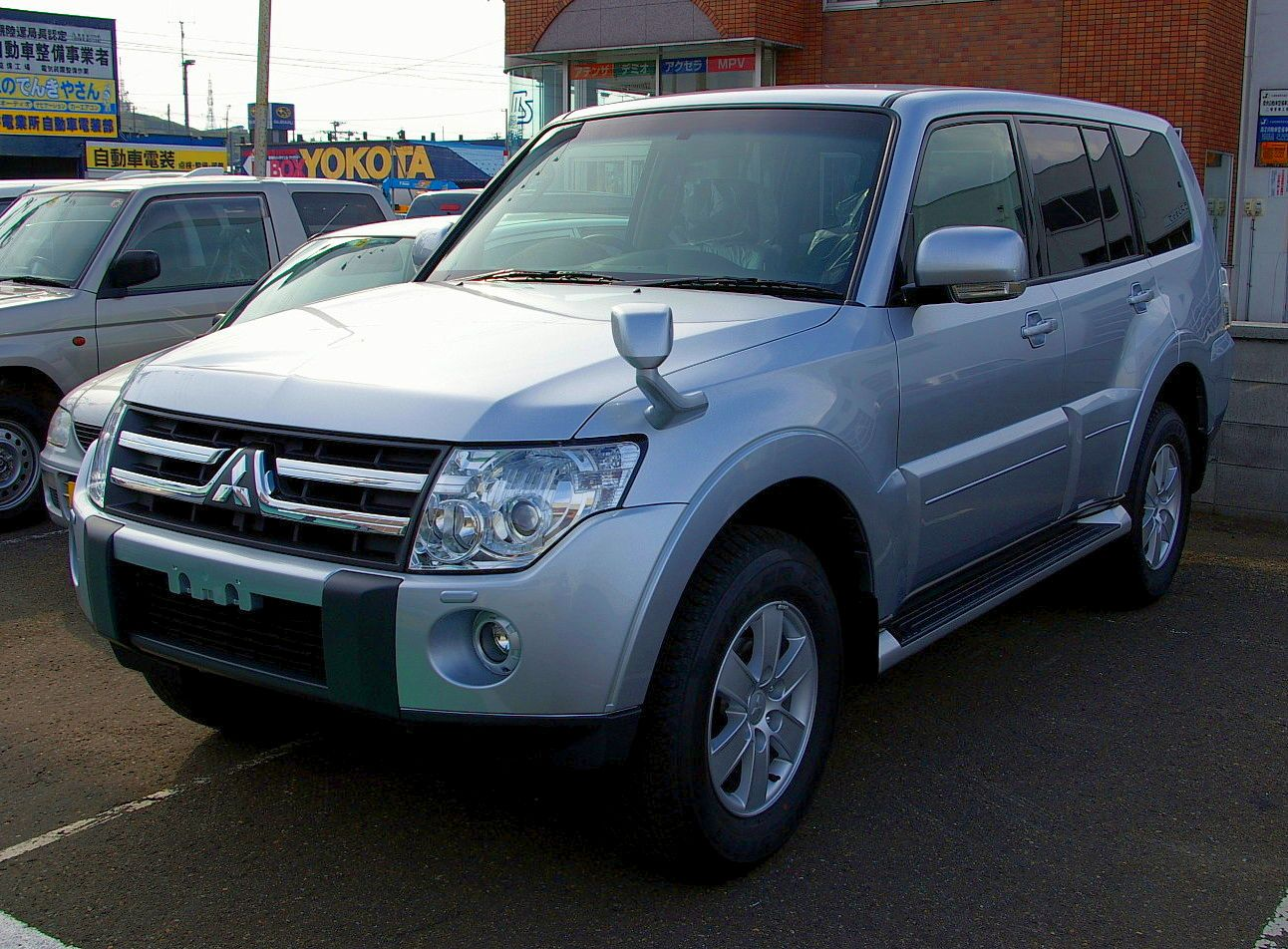 Mitsubishi Pajero(4th).